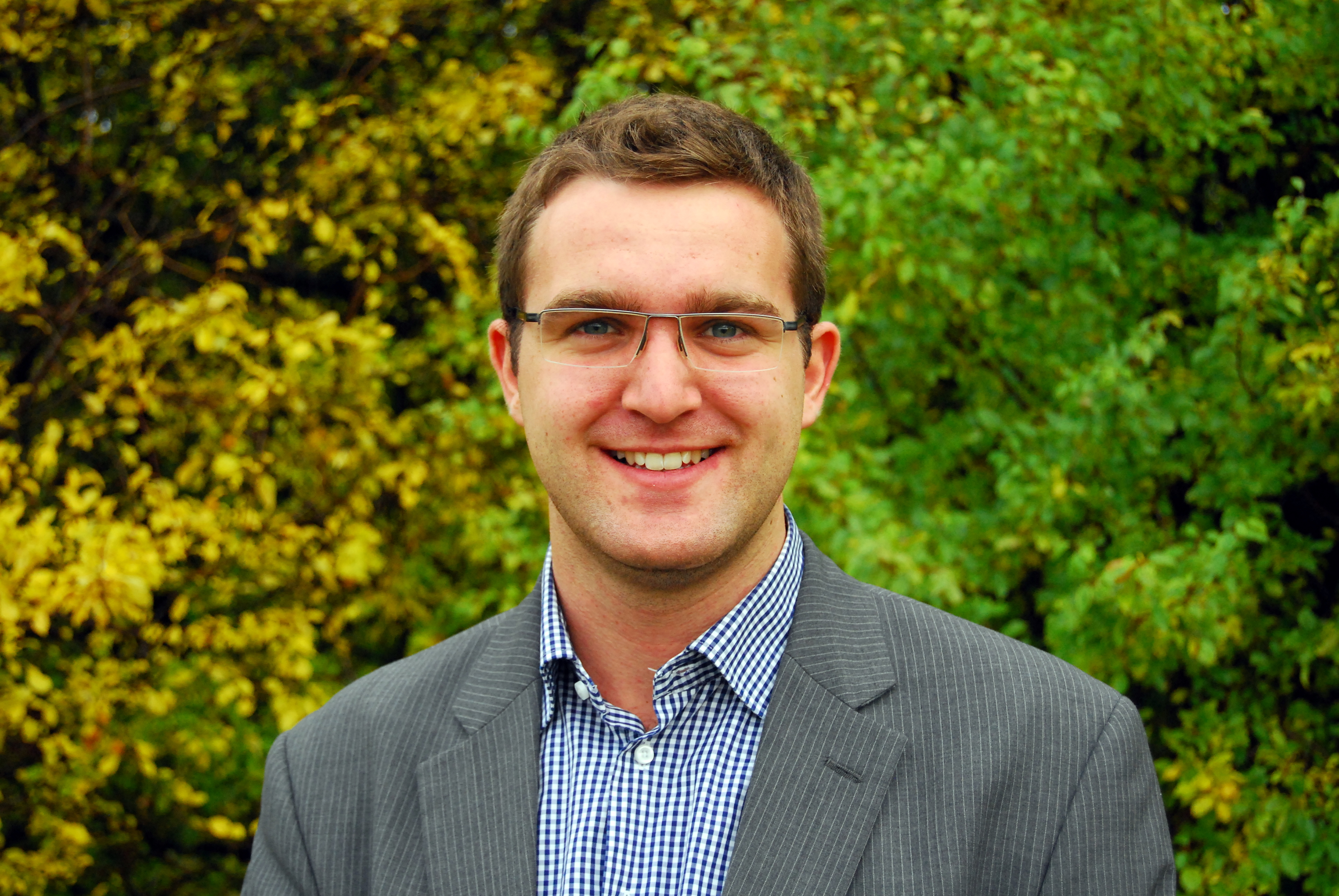 Simon Dyhr, portræt.